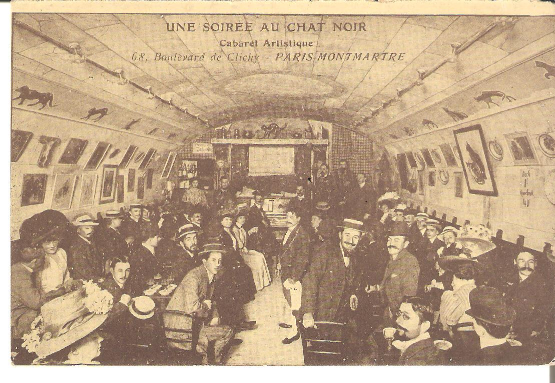 Soirée au cabaret le Chat Noir